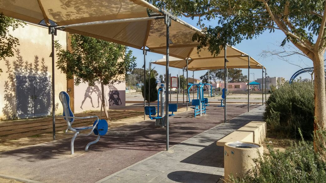 אורט ספיר ירוחם